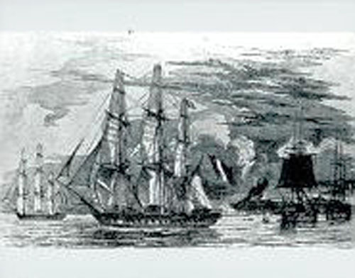 Bloqueo Frances durante la Pimera Intervencion Francesa o Guerra de los Pasteles